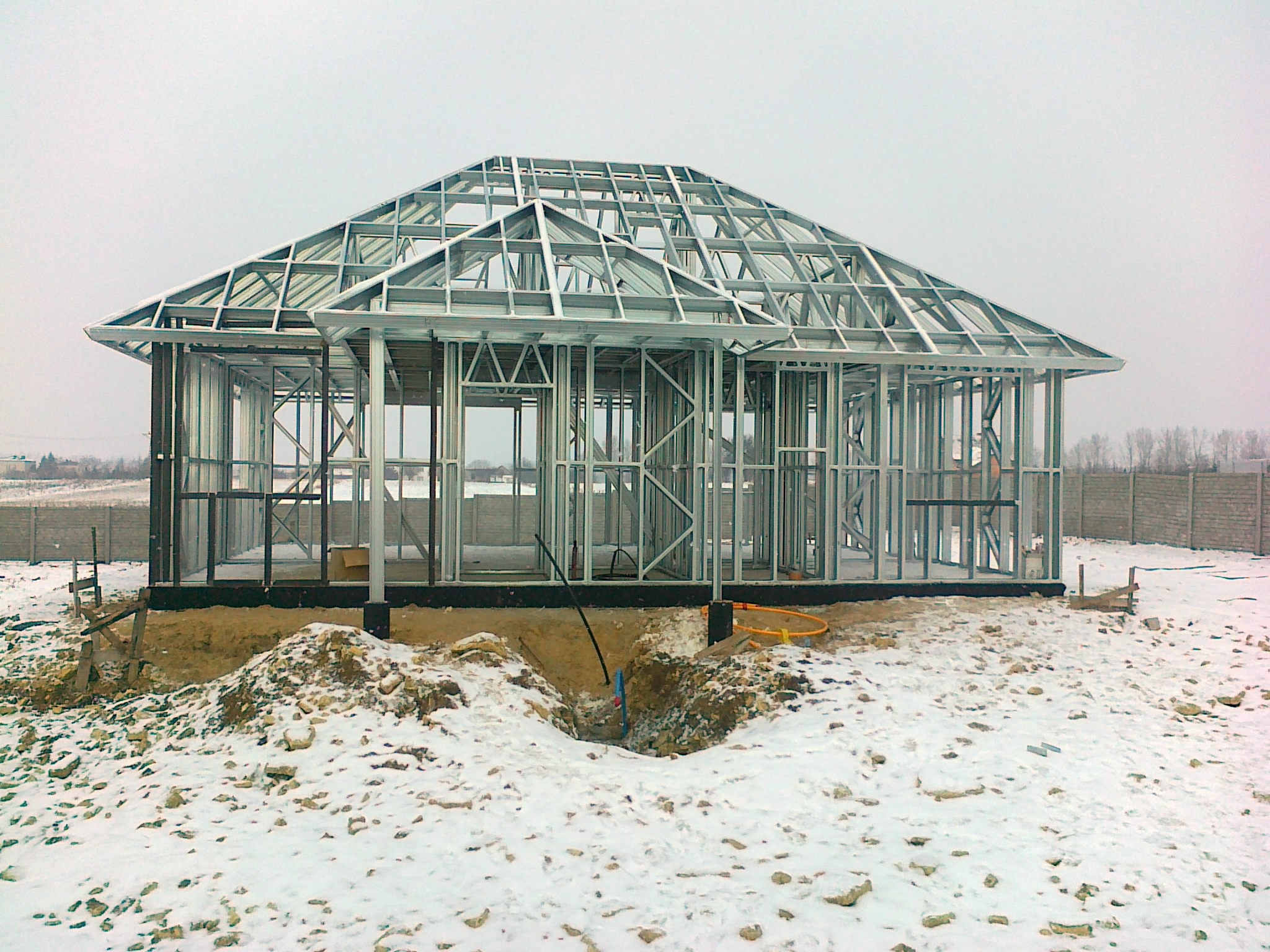 Zdjęcie konstrukcji stalowej domu jednorodzinnego w technologii SCS. Budowa w okolicach Siewierza, luty 2011